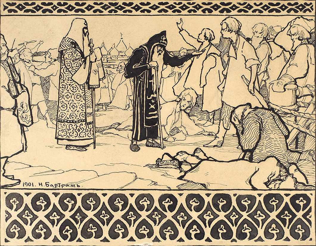 Бартрам Н. Д., Усмирение, 1901 г. Бумага, тушь, перо, кисть.